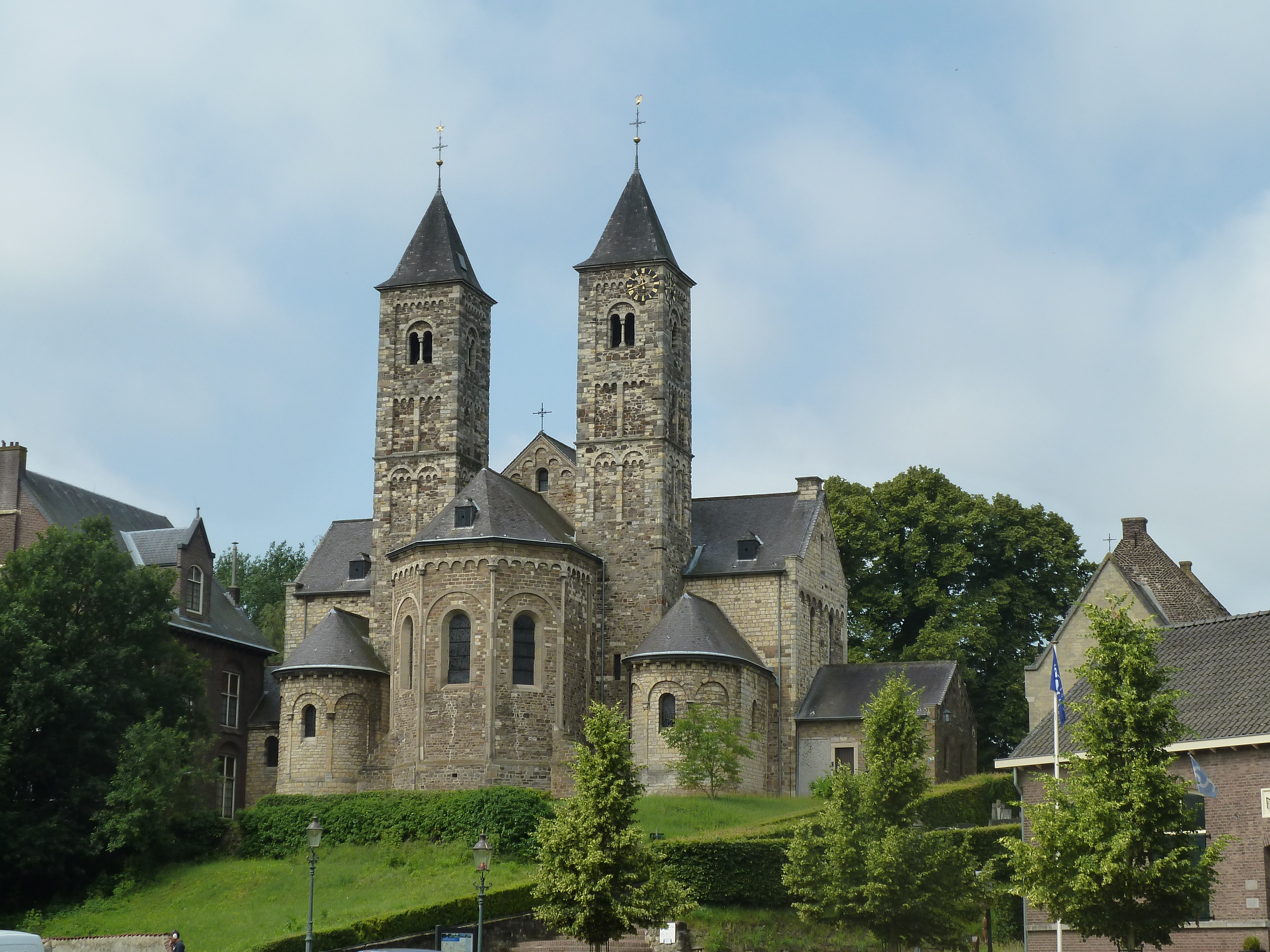 Basiliek van Sint Odiliënberg, Roerdalen, Limburg, Nederland